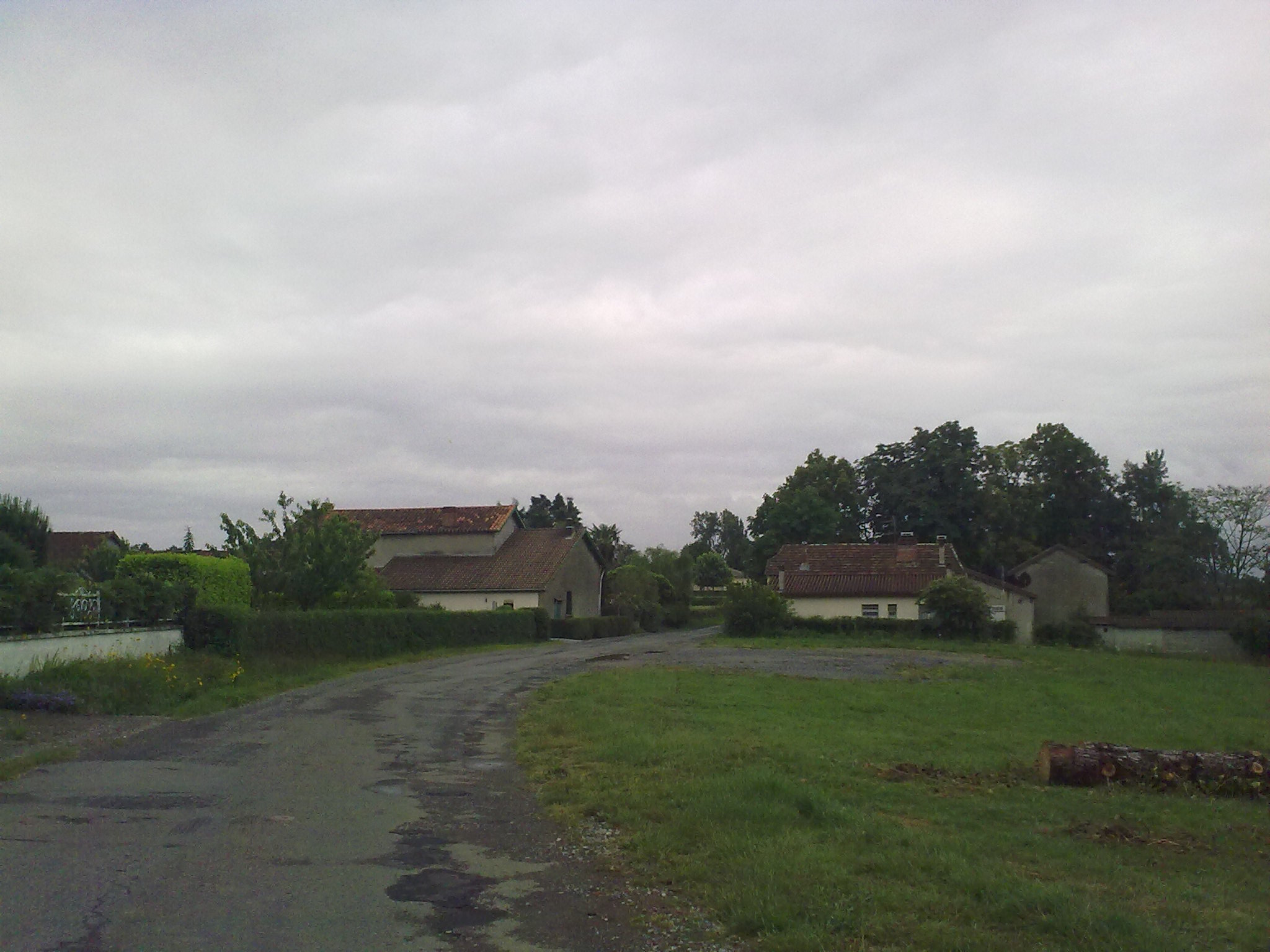 Aubous